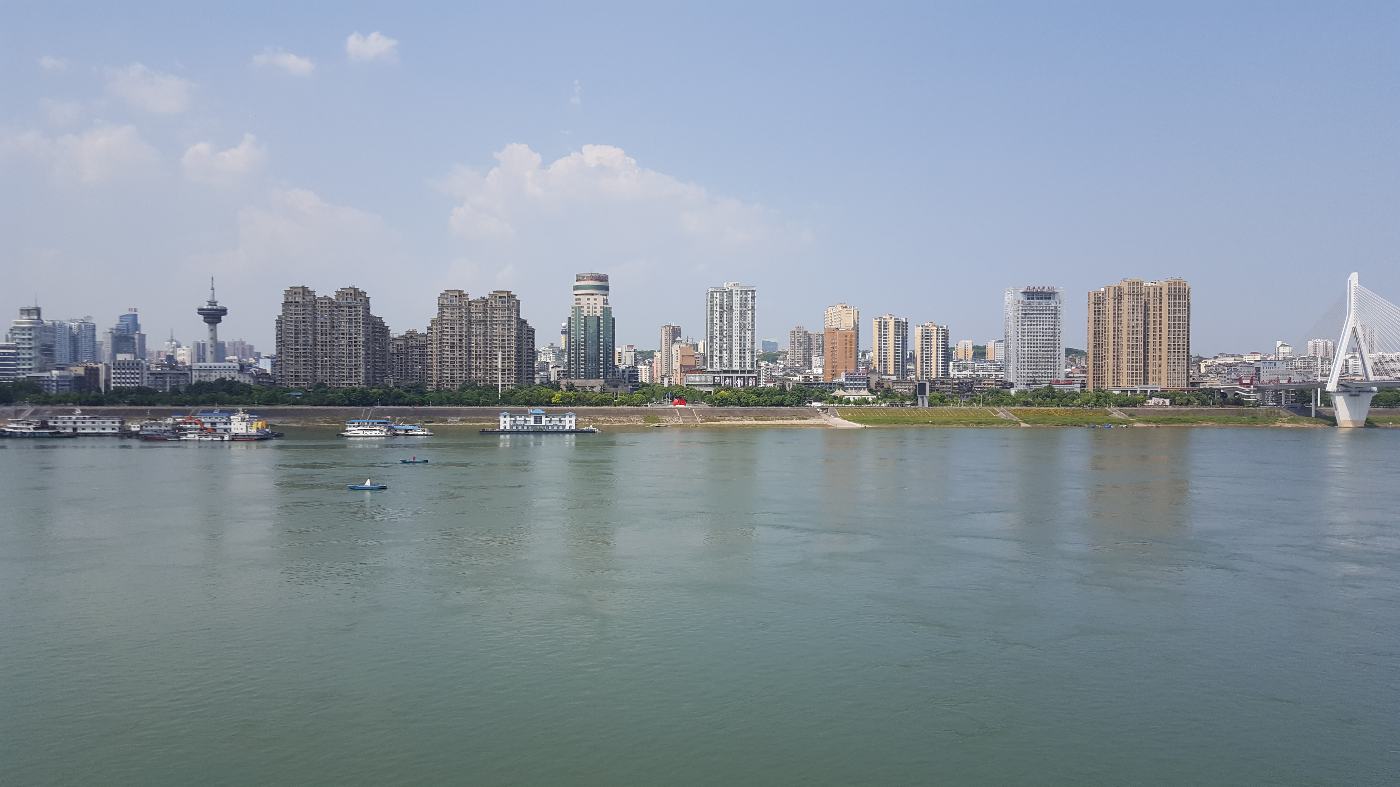 宜昌天际线，拍摄于磨基山观景平台